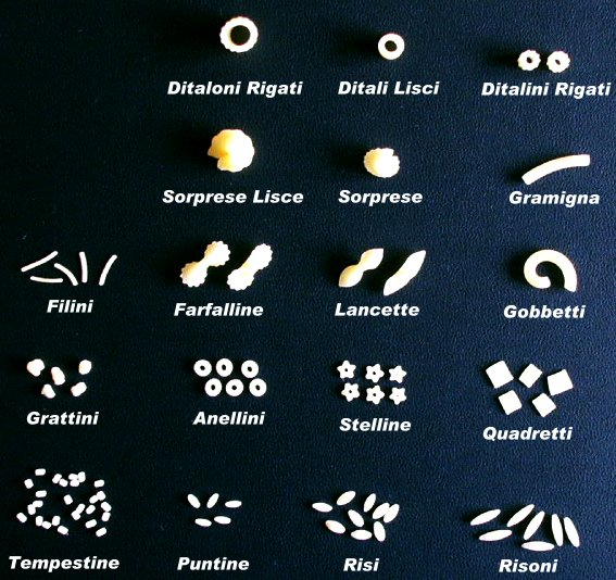 Pastasorten